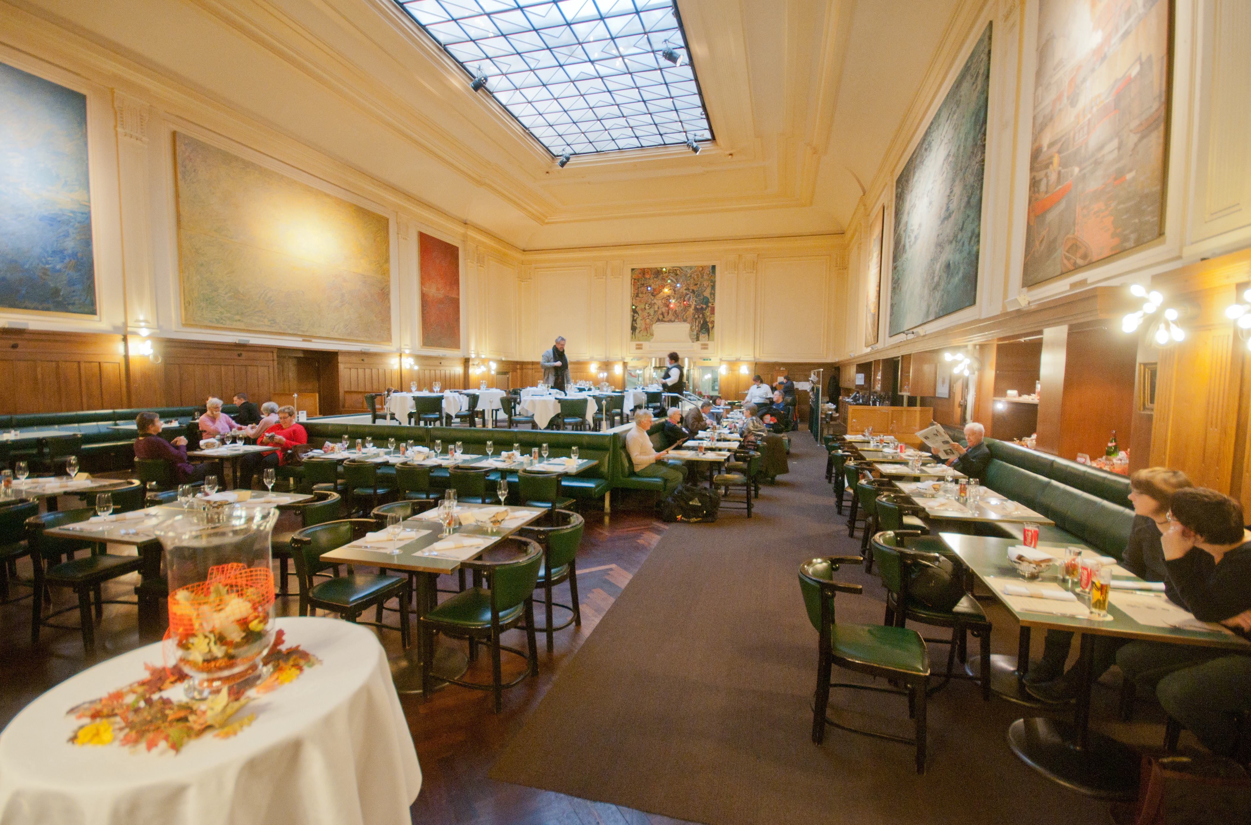 Bahnhofsrestaurant Basel